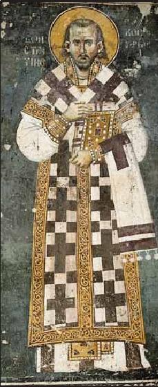 Фреска на Константин Кавасила от охридската църква Света Богородица Перивлепта (Свети Климент) от Михаил и Евтихий